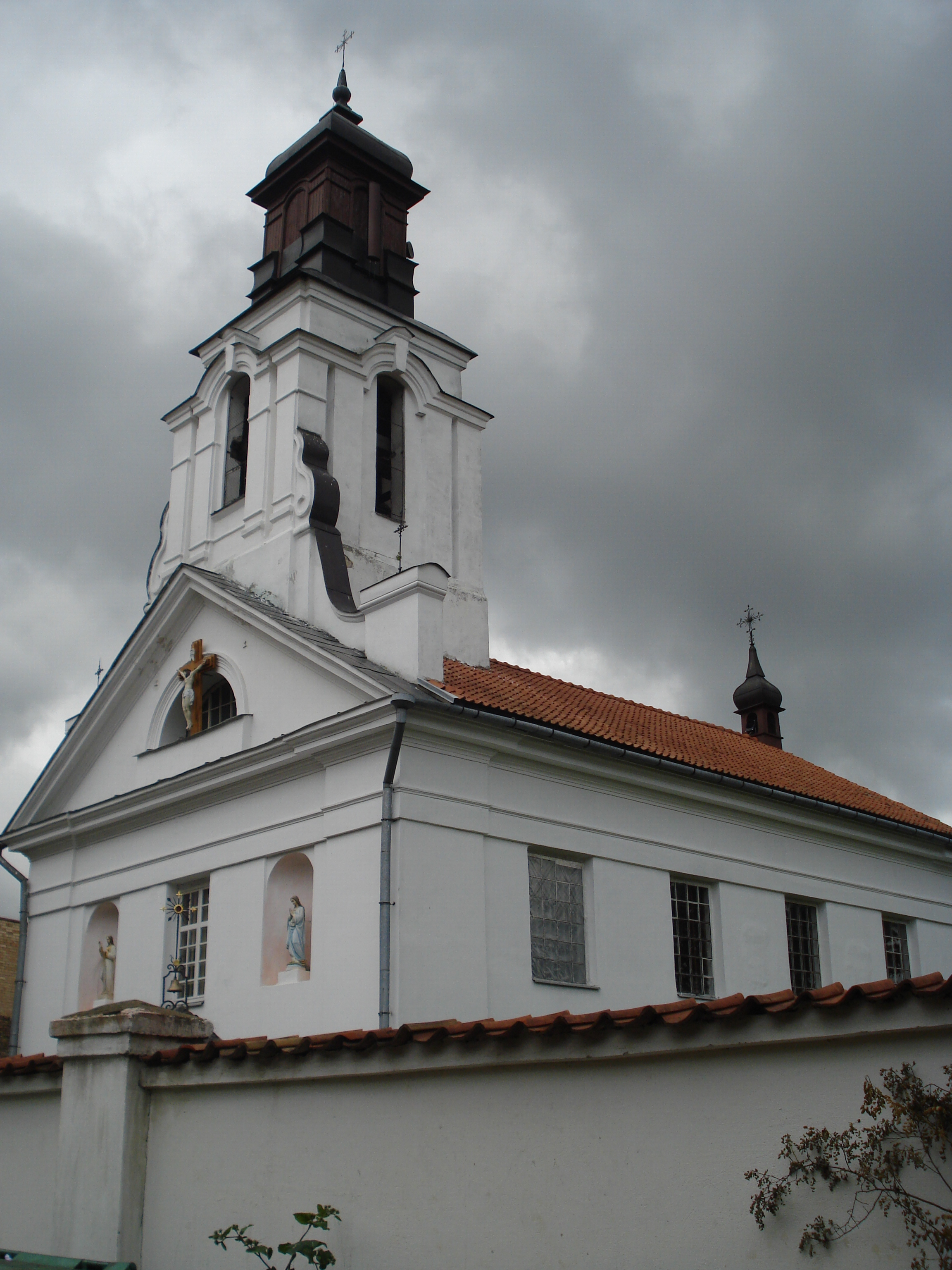 The Church of St. Batholomew (Švento Baltramiejaus bažnyčia, Świętego Bartłomieja) in Vilnius. Užupio g. 17a